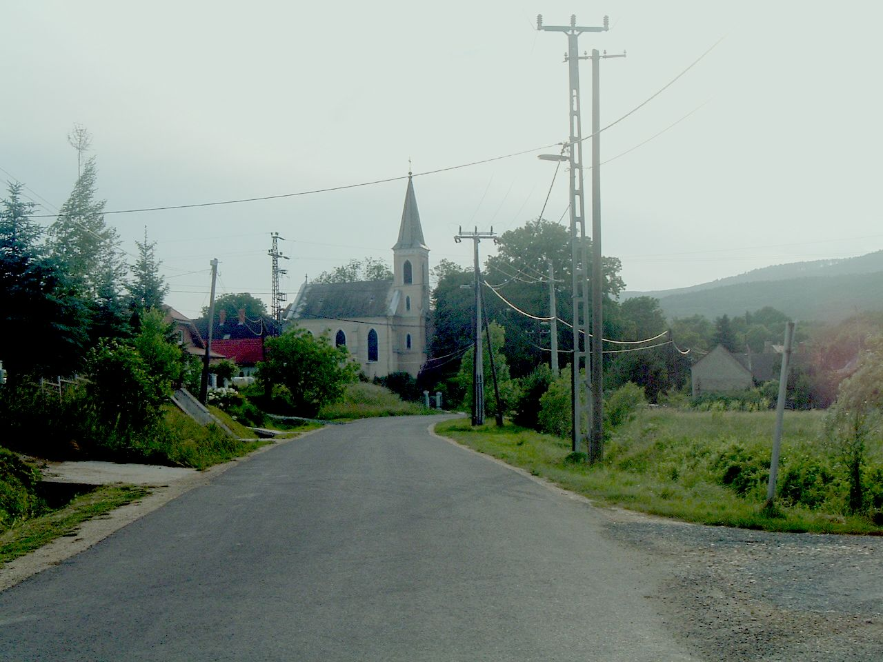 Cák, Hungary